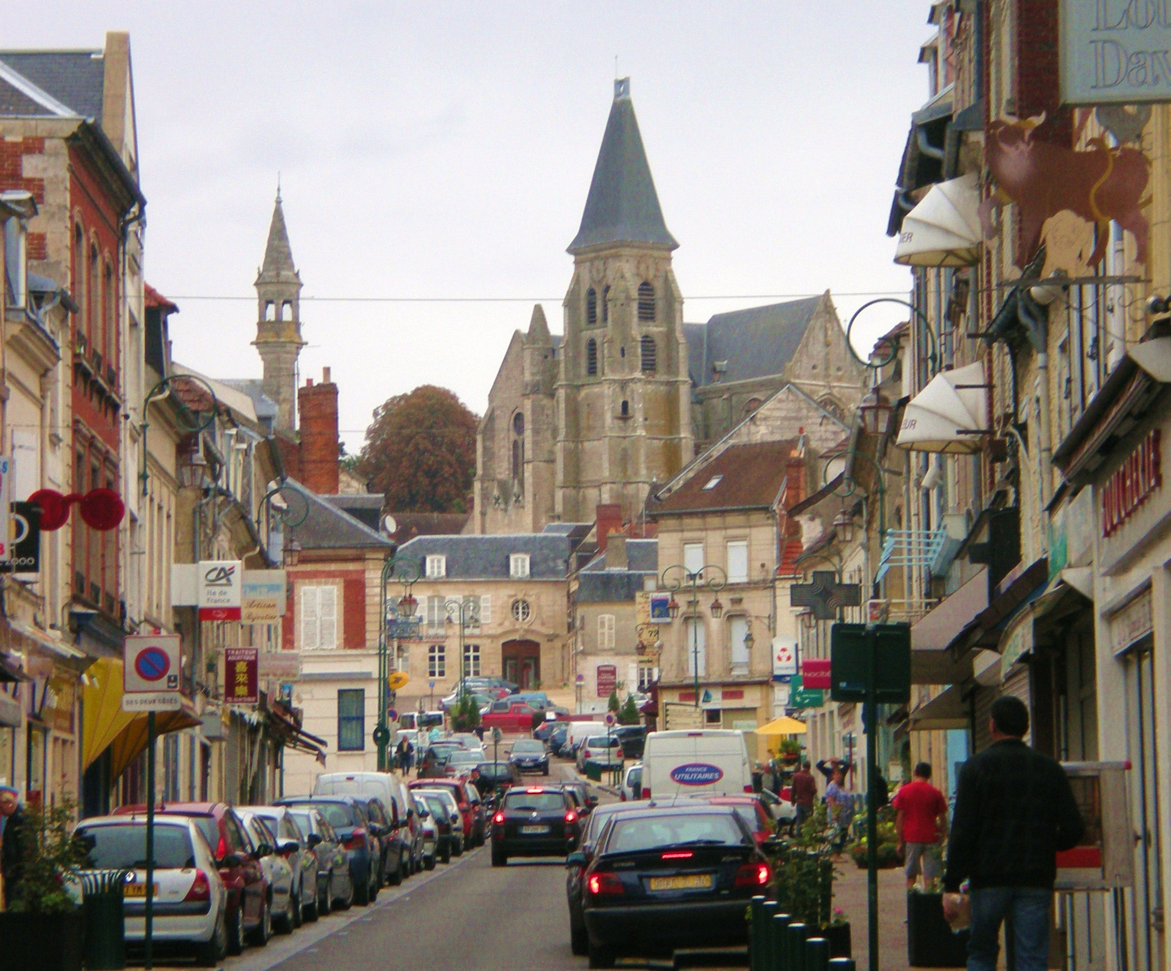 La rue de la république à clermont (oise), rue commerçante